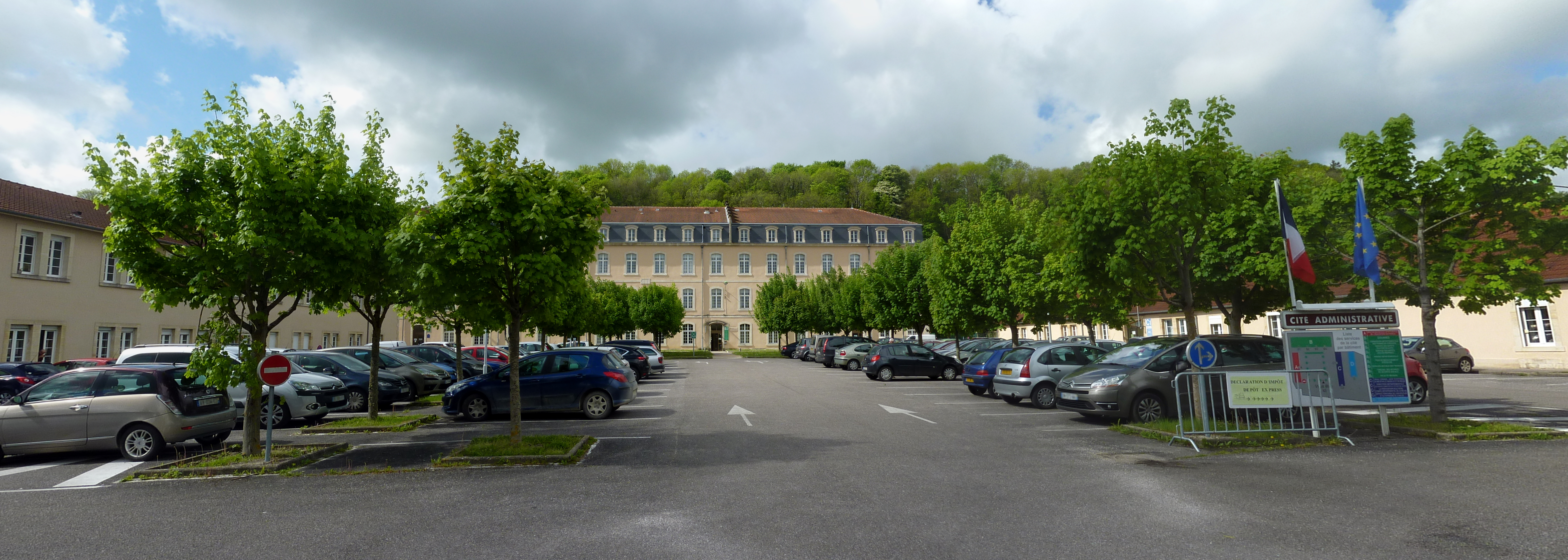 Cité administrative de Bar-le-Duc.